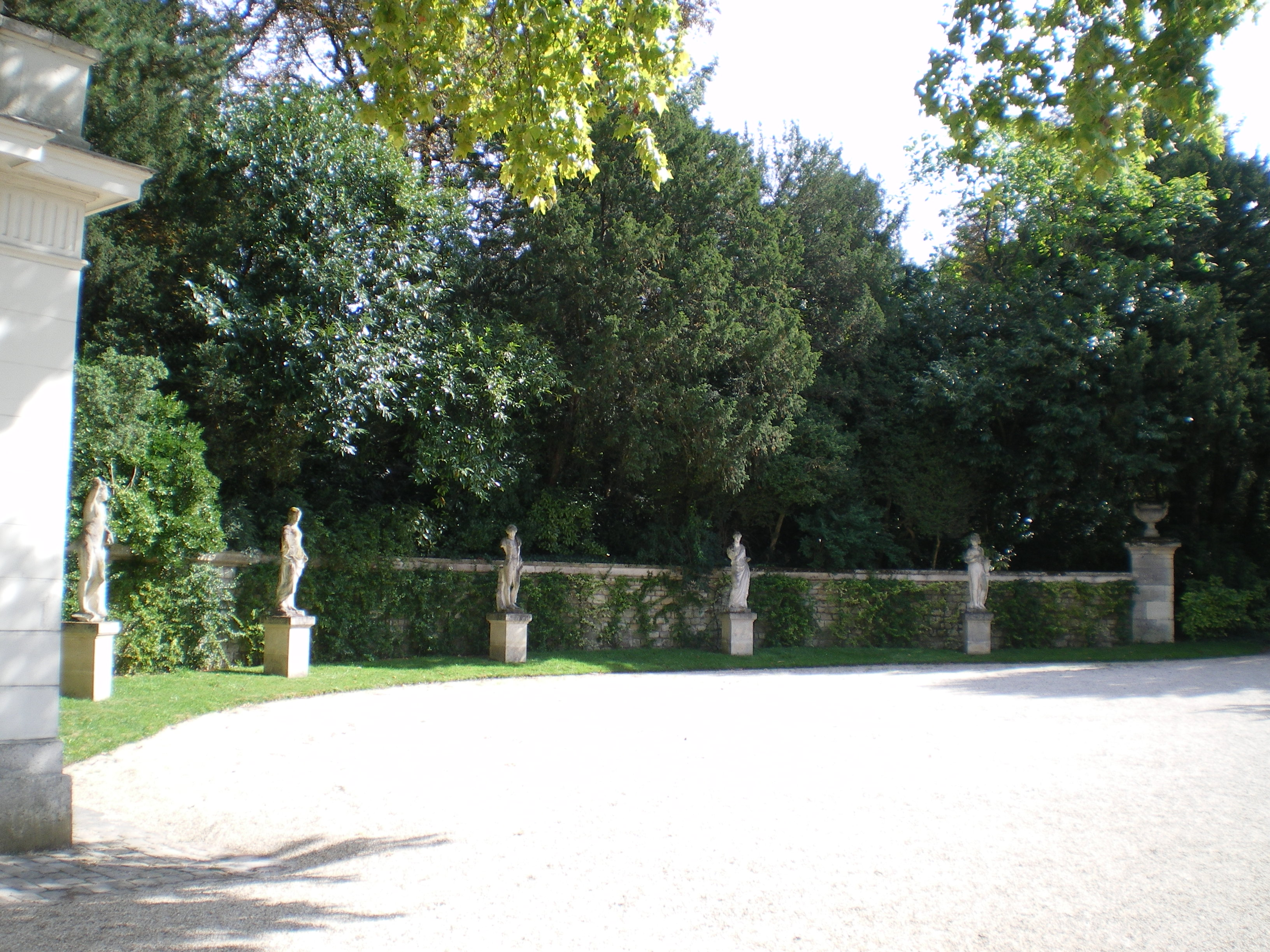 Bagatelle : les statues provenant de Bonnemare